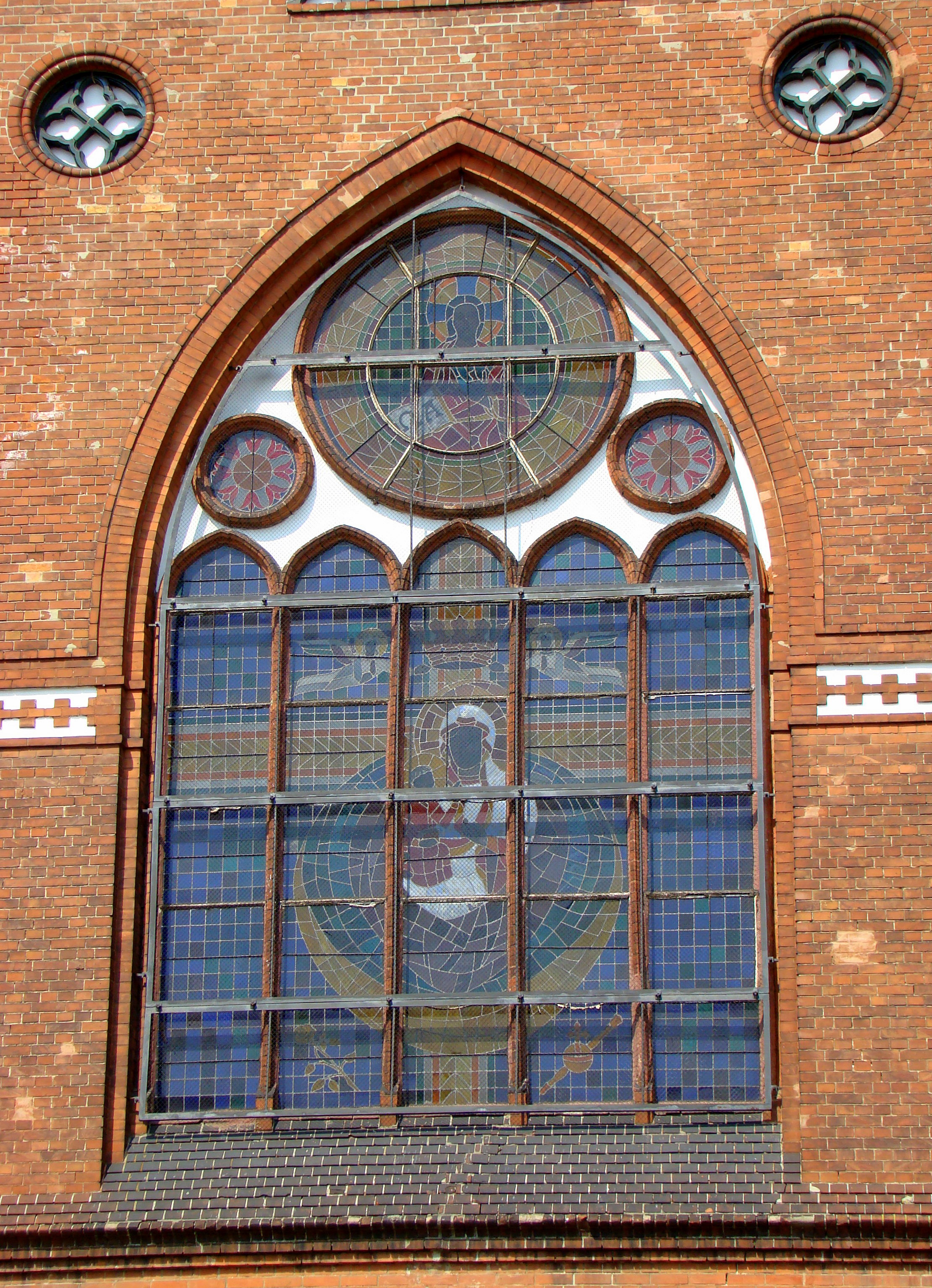 Kościół Niepokalanego Poczęcia NMP w Policach (witraż w ścianie południowej), Polska